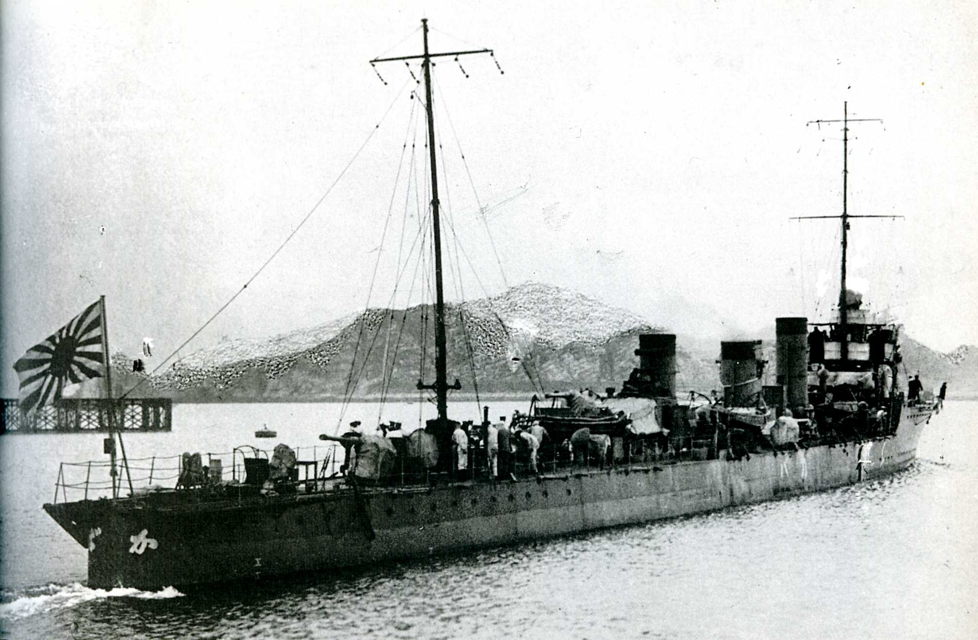 Japanese destroyer Kaba at Ryojun 1925